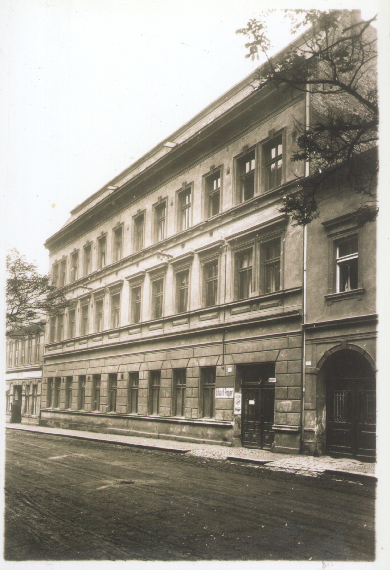 מפעל משפחת פרופר בטפליצי, צ'כיה